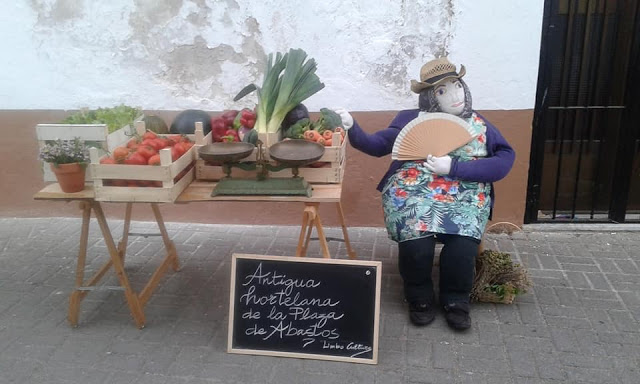 Muñeca presentada en las fiestas "Las muñecas de San Juan" de Olivenza (Badajoz) por la Asociación Limbo Cultura